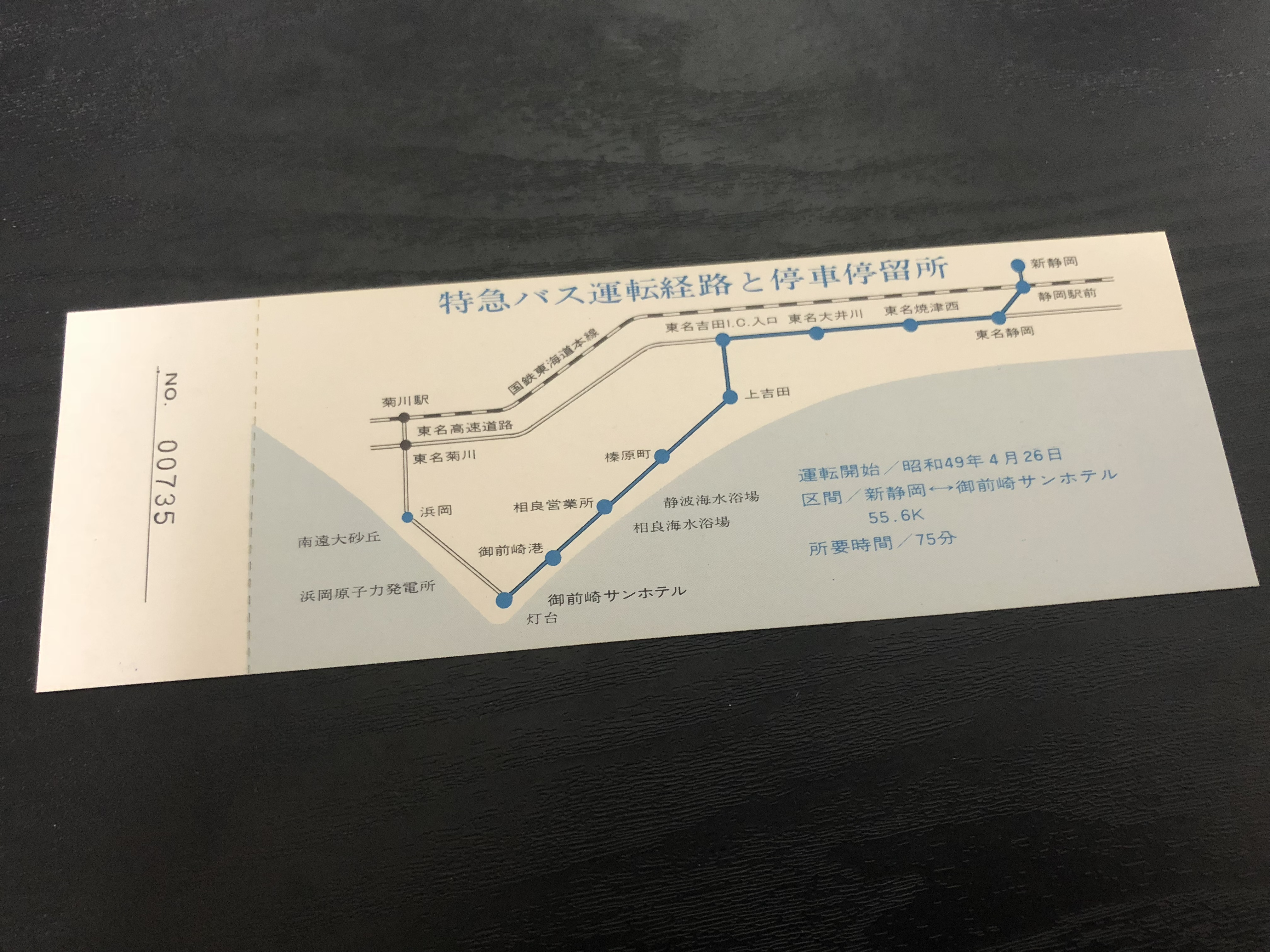 オークションで購入したものです。